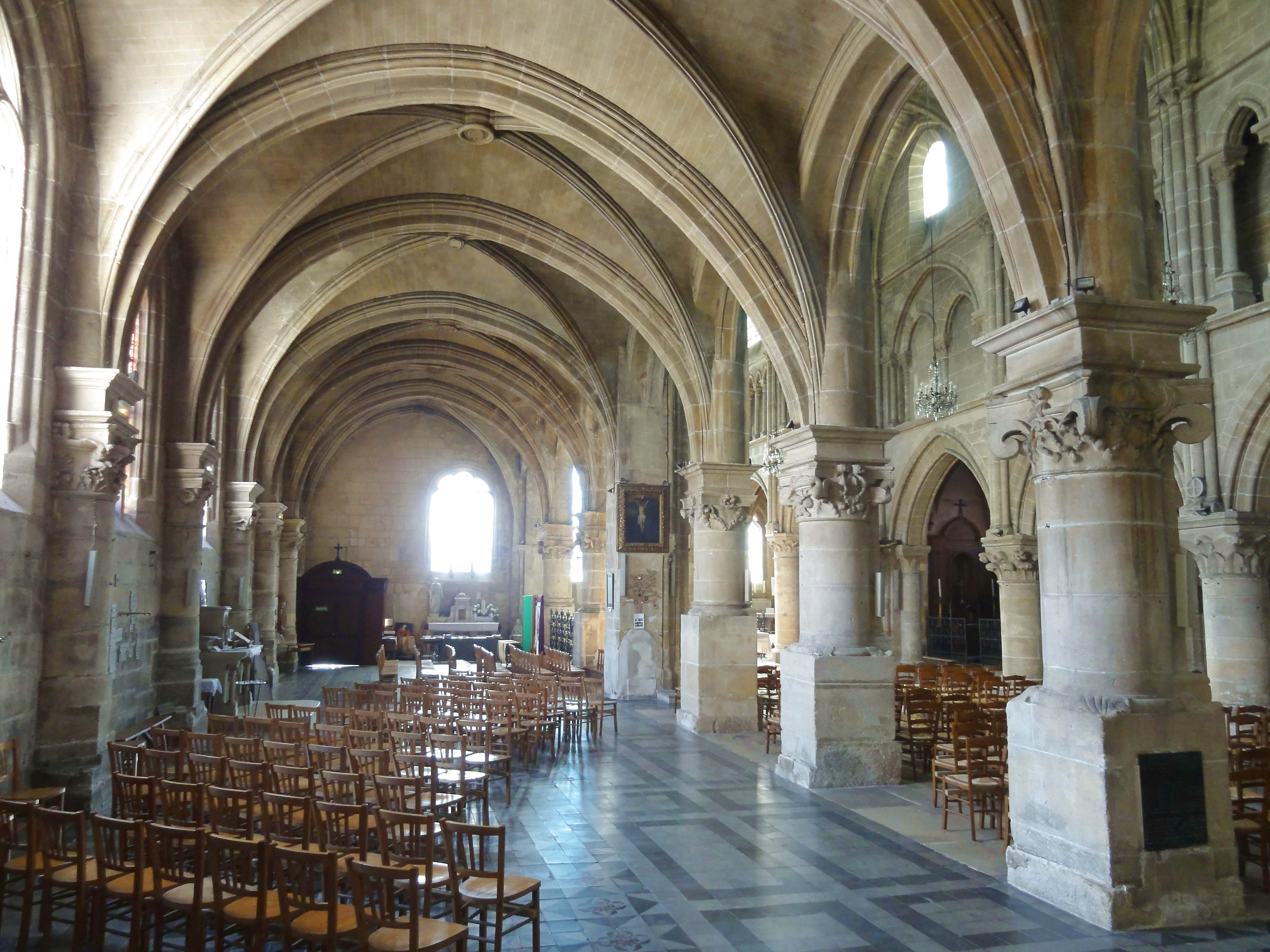 Intérieur de l'église - voir titre.